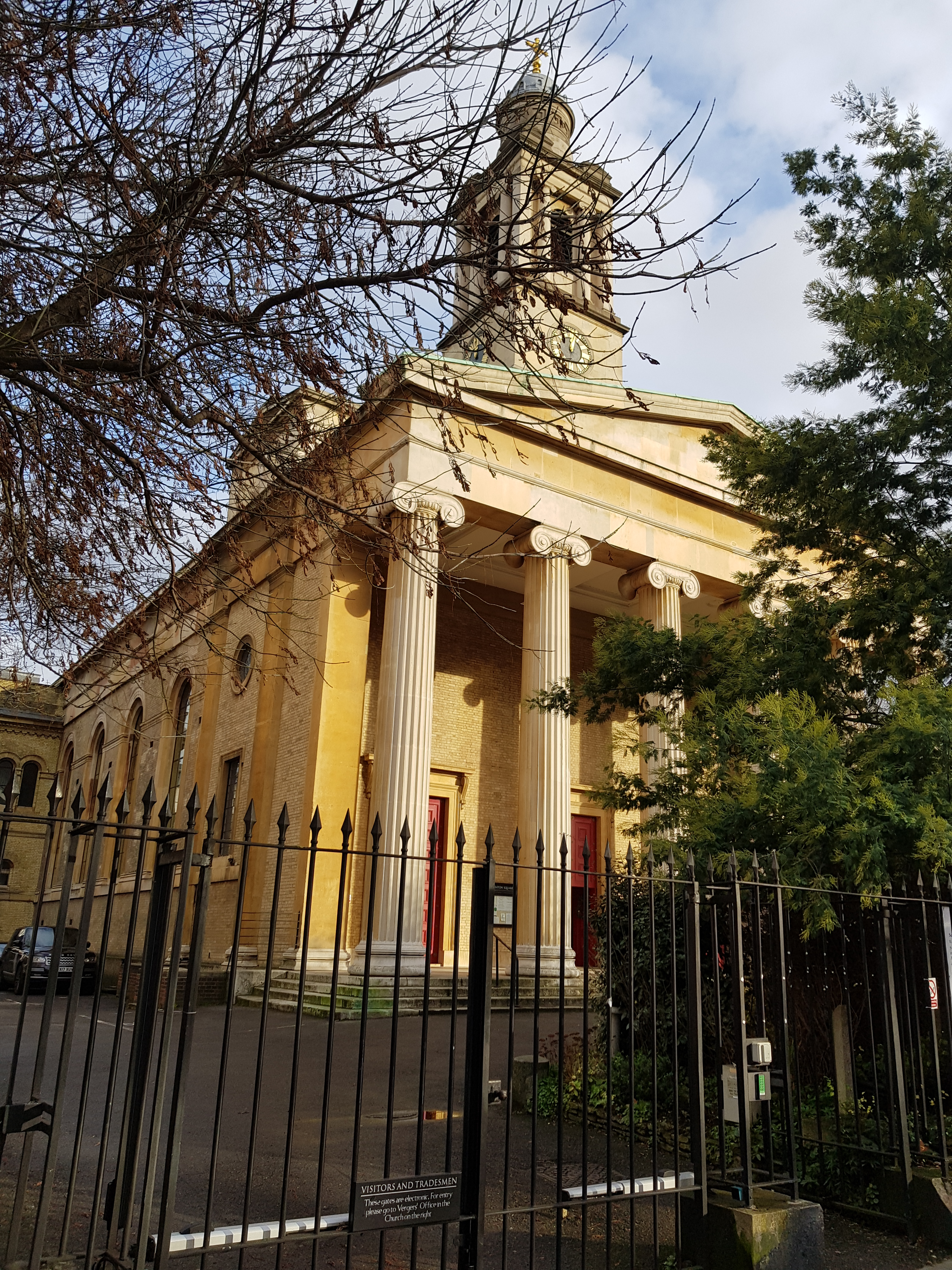 Eglise Saint-Pierre, 119, Eaton Square, Londres.